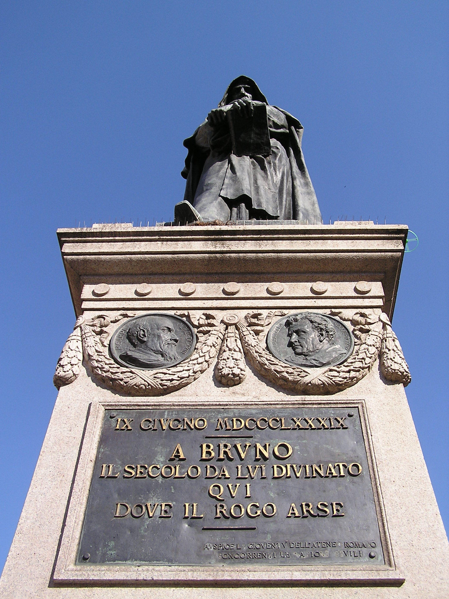 Il monumento a Giordano Bruno in Campo de' Fiori a Roma, in una prospettiva dal basso.